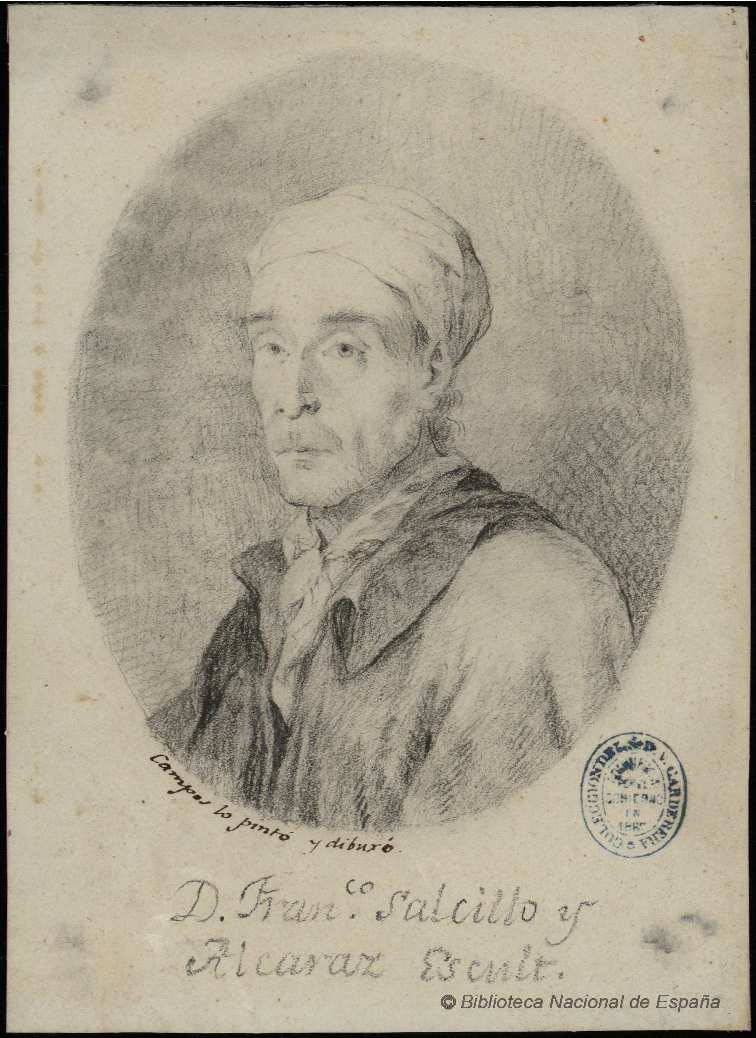 Retrato de Francisco Salzillo. Inscripciones: "Campos lo pintó y dibuxó", "D. Fran.co Salcillo y /Alcaraz Escult". Dibujo a lápiz grafito sobre papel amarillento. Biblioteca Nacional de España